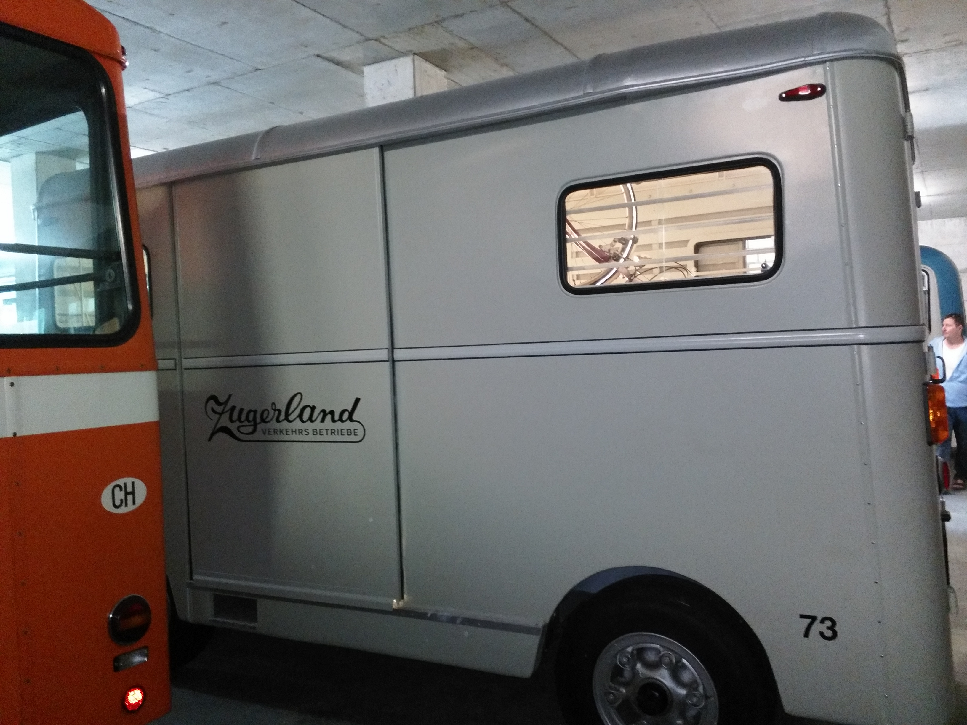 Gepäckanhänger ZVB